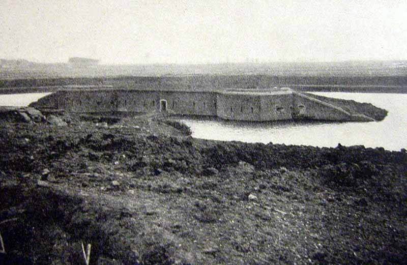 Вид на головной капонир антверпенского форта Вавр С.-Катрин с его территории.